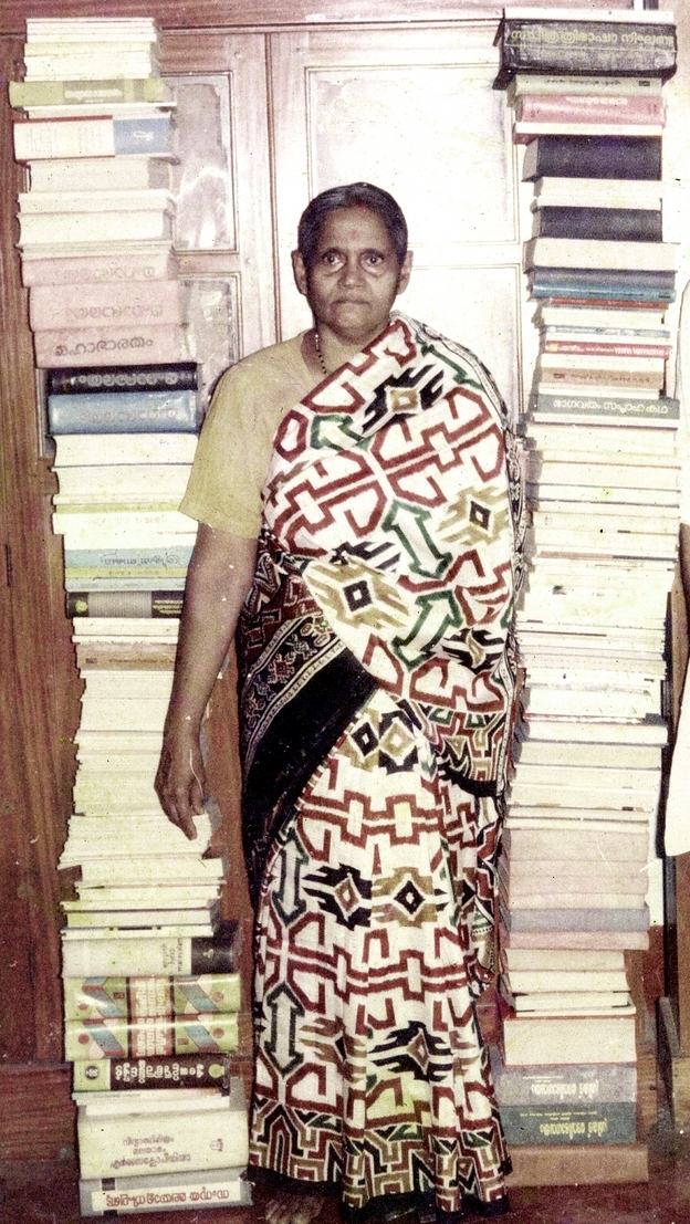 R. Leela Devi along with the books published along with V. Balakrishnan